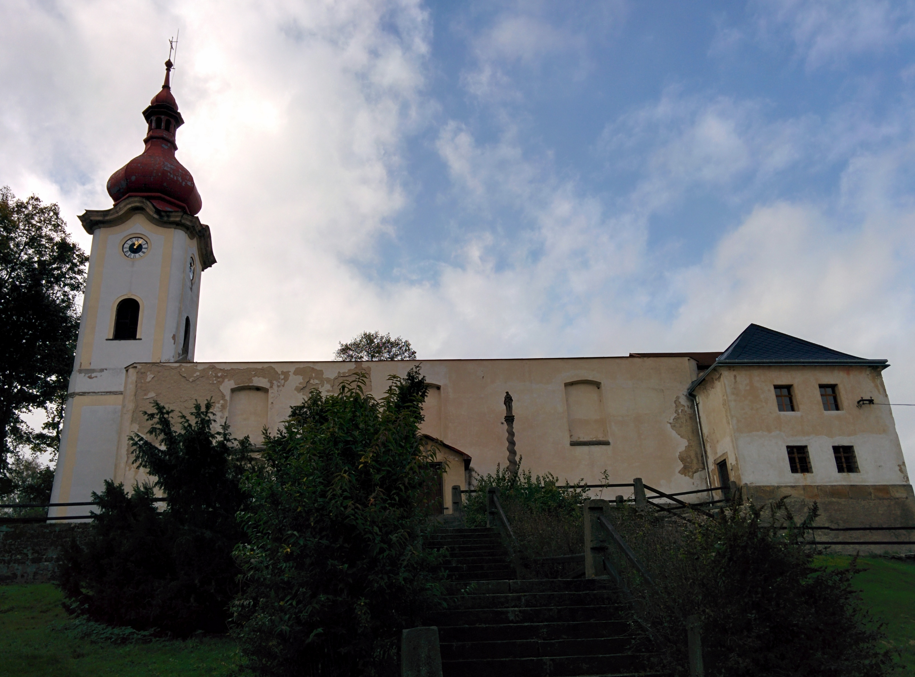 Ruine der Kirche St. Nikolaus in Peterswald (Petrovice), Tschechien.